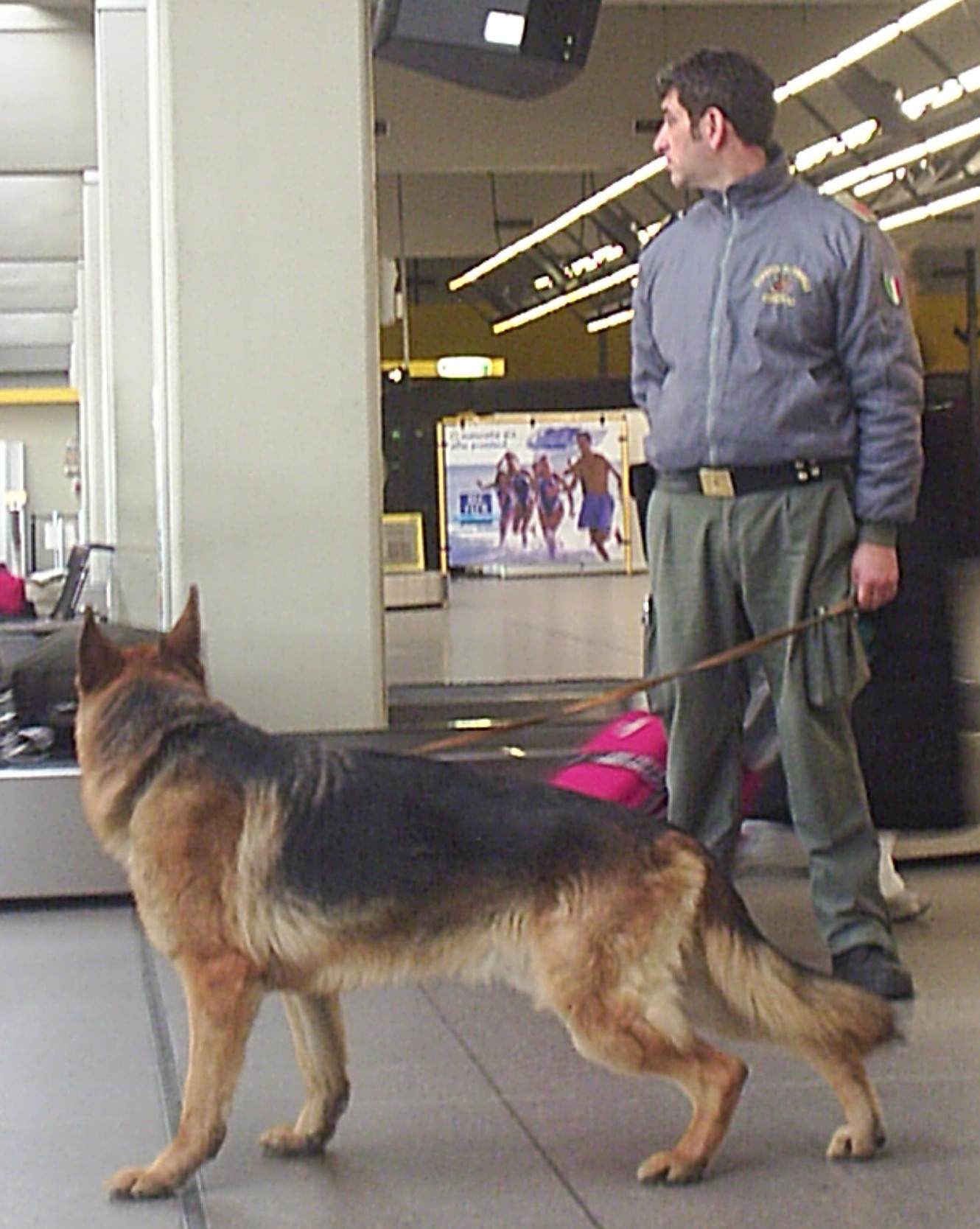 Guardia di Finanza Cinofili (K9 Unit) - Malpensa